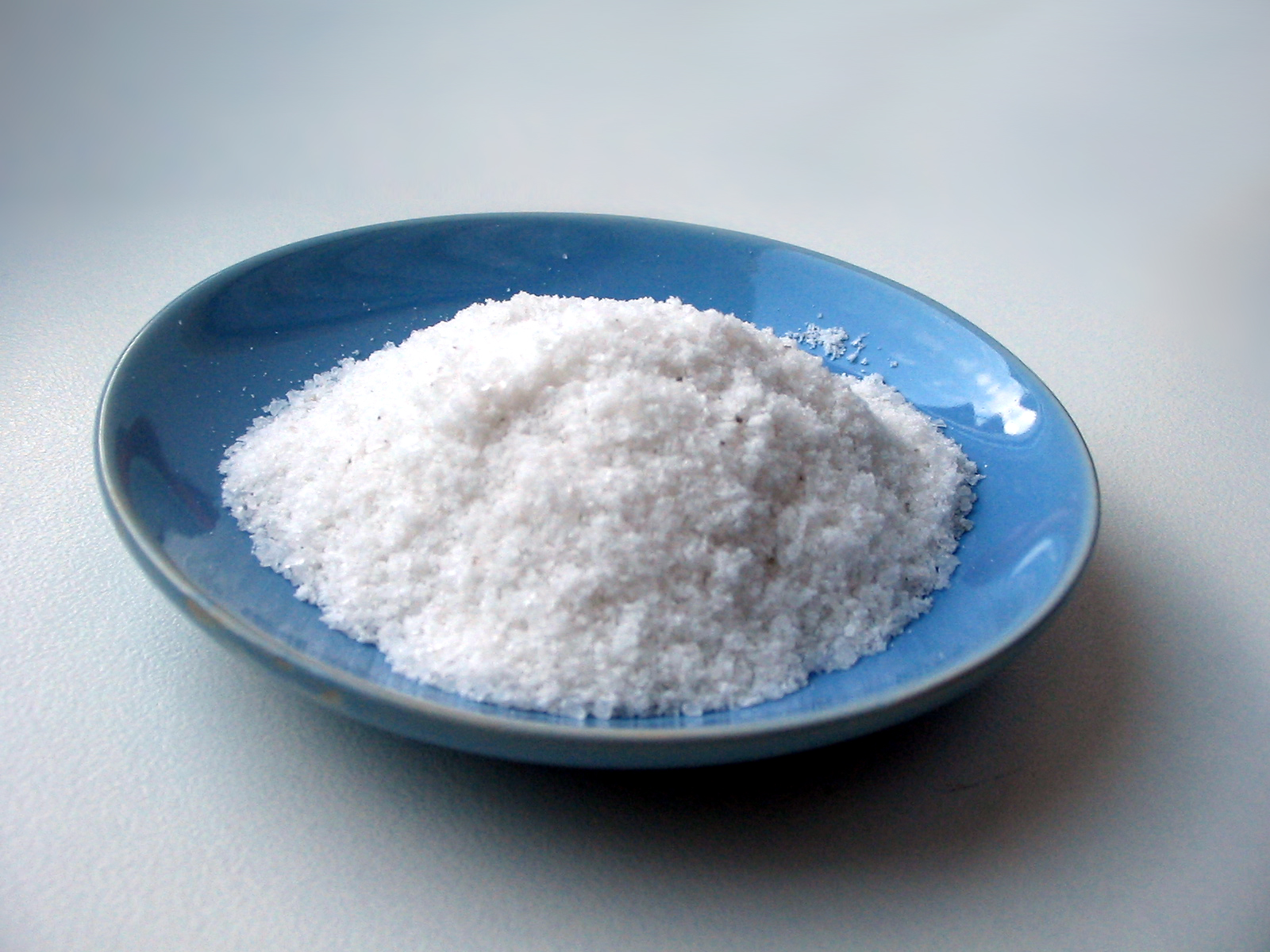 Сіль кухонна кам'яна помолу №1